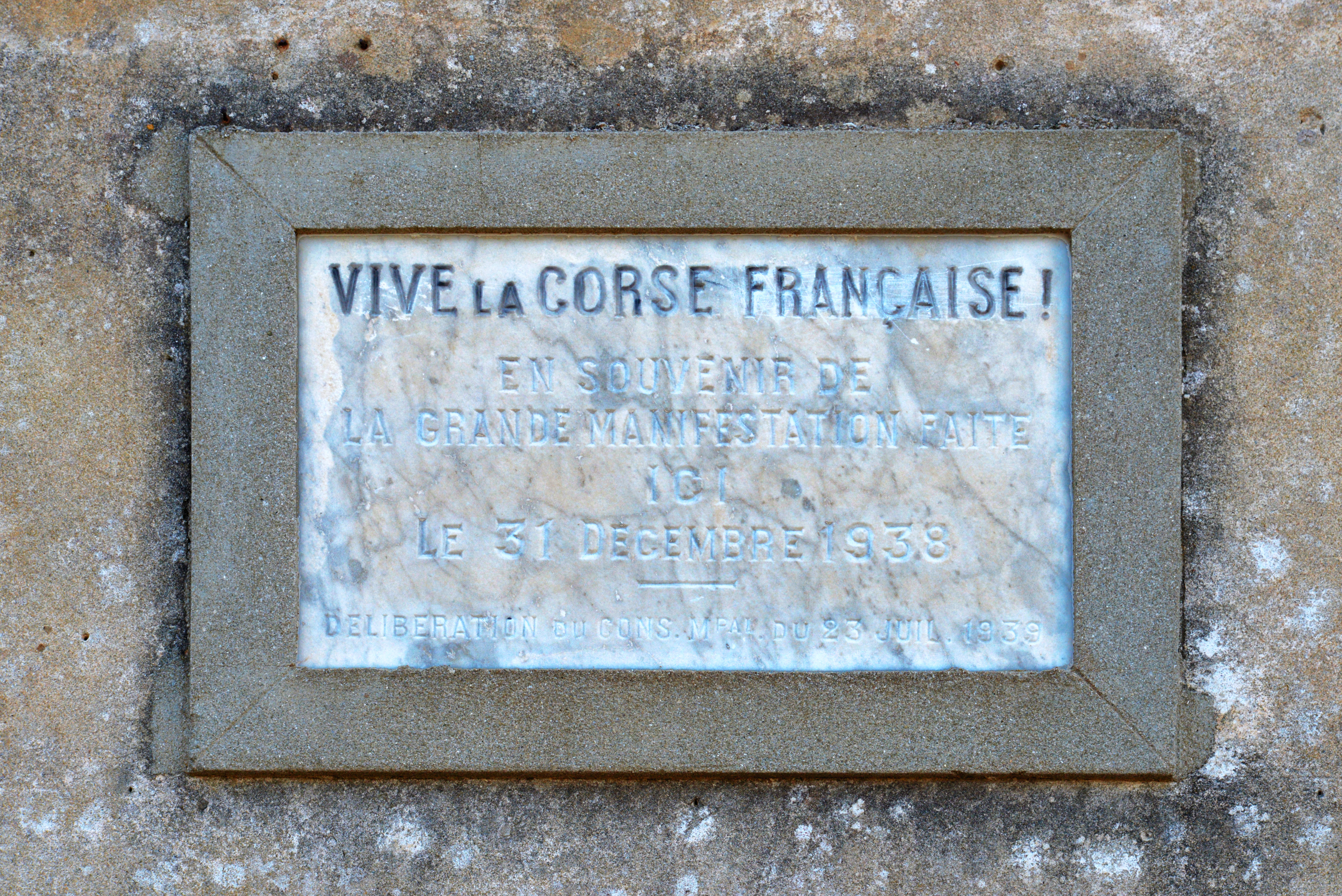 Centuri, Cap Corse (Corse) - plaque commémorative sur la façade principale de la chapelle de la confrérie des Pénitents de la Sainte-Croix (de l'ensemble paroissial Saint-Sylvestre inscrit MH), apposée à la veille de la Seconde Guerre mondiale.